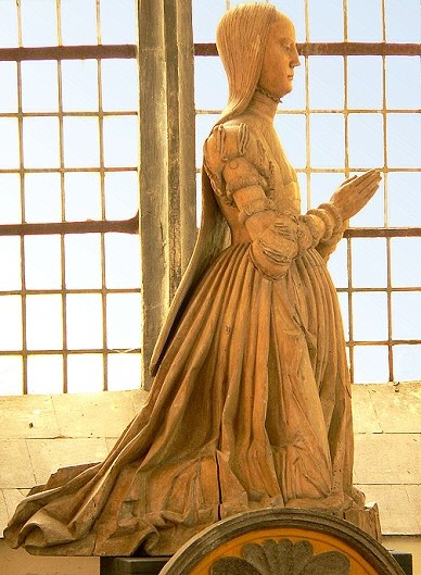 Clara von Sachsen-Lauenburg, Ehefrau von Herzog Franz von Braunschweig-Lüneburg (Gifhorn), Holzplastik in der Schlosskapelle Gifhorn, Erlaubnis des Heimatmuseums Gifhorn zur Abbildung liegt vor. Foto aufgenommen von Benutzer Benutzer:Axel Hindemith, Juni 2005